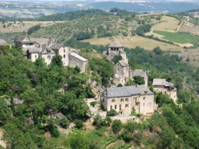 Village de Cassagnes Comtaux